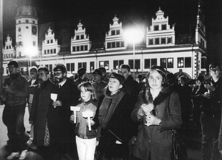 Leipzig, Schweigemarsch mit Kerzen ADN 22.9.90 Leipzig: Herbst 1989 Mit Kerzen unterstrichen die Teilnehmer des Schweigemarsches am 9.11.1989 ihre friedlichen Forderungen. [Leipzig.- Demonstranten vor dem Rathaus.]